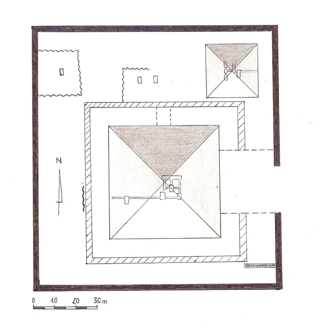 Plan du complexe funéraire de Khendjer